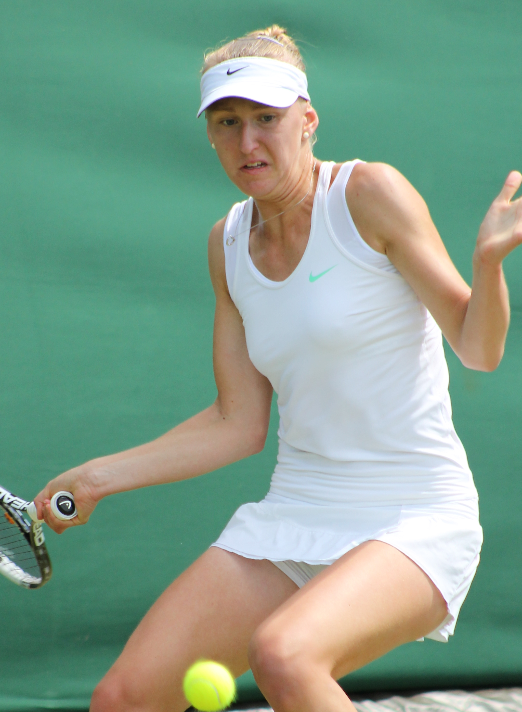 Smitkova WMQ14 (11)